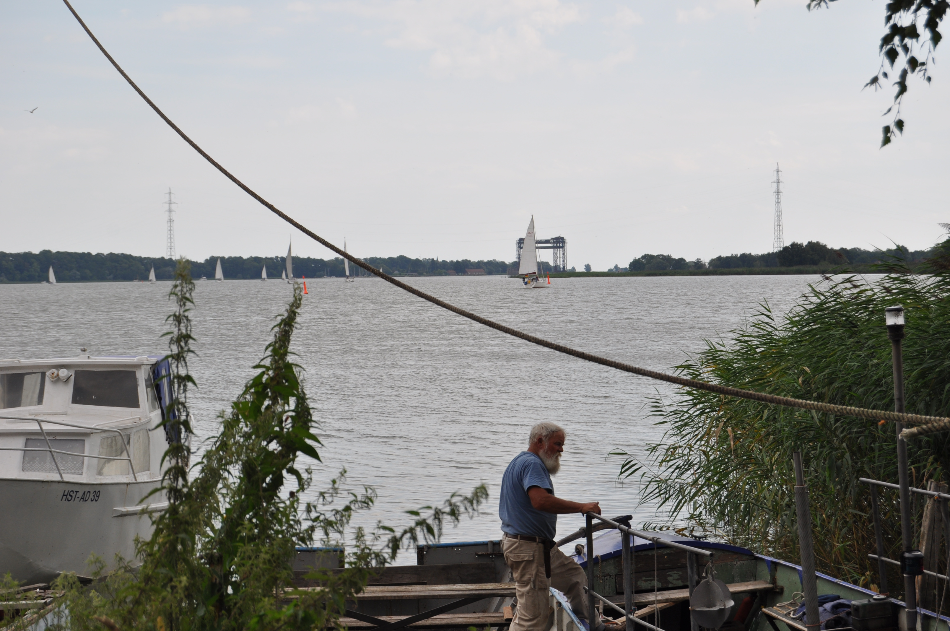 Blick von Anklamer Fähre zur Karniner Brücke, hinten Peenestrom-Freileitungskreuzung Karnin